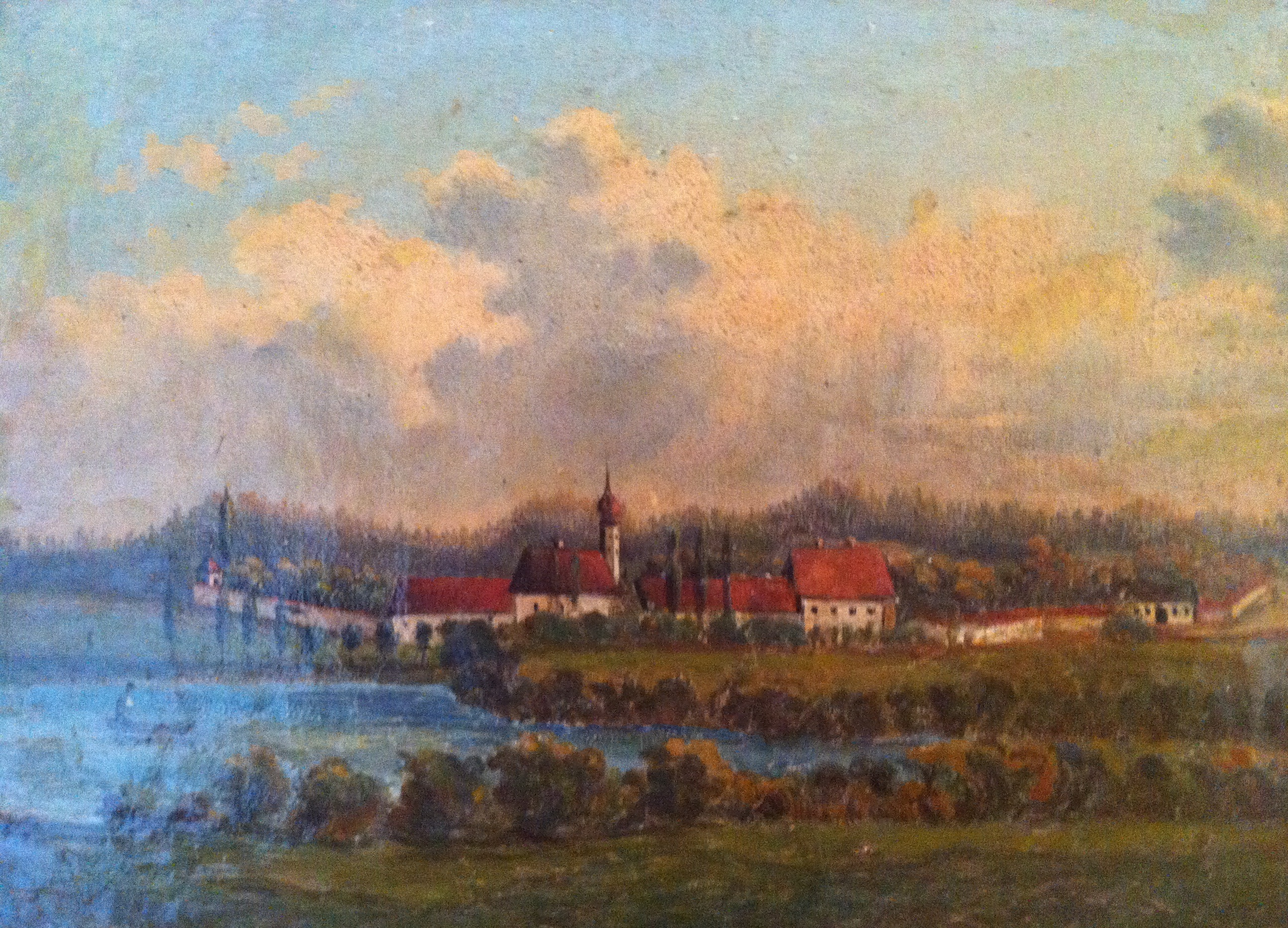 Die erste künstlerische Abbildung des Spindlhof in Regenstauf. Das Werk entstand um 1800 und zeigt die Spindlmühle samt Kapelle und einigen Nebengebäuden